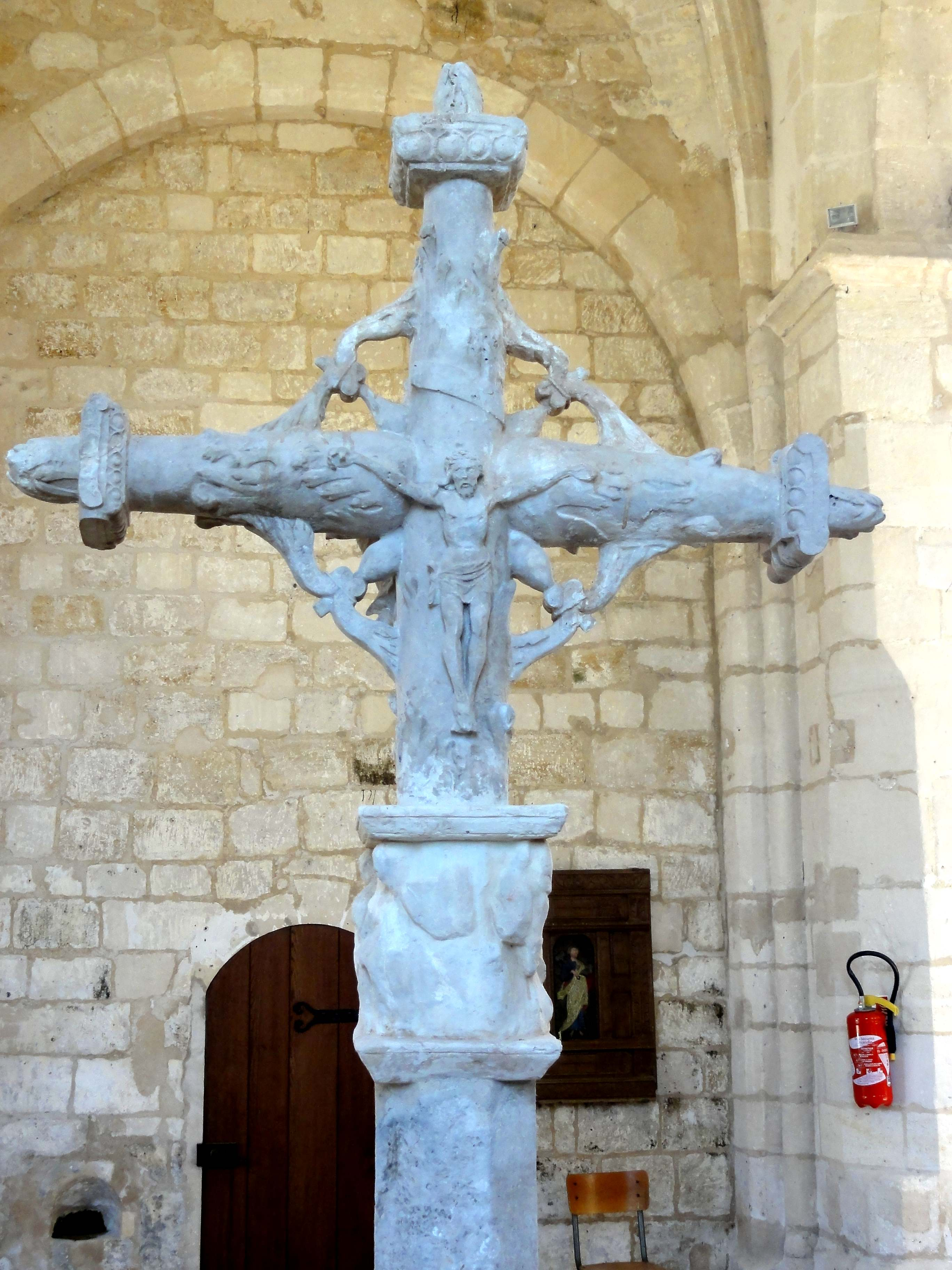 Croix de cimetière de Genainville, original conservé dans l'église depuis qu'il a été renversée par la foudre et remplacé par une copie.